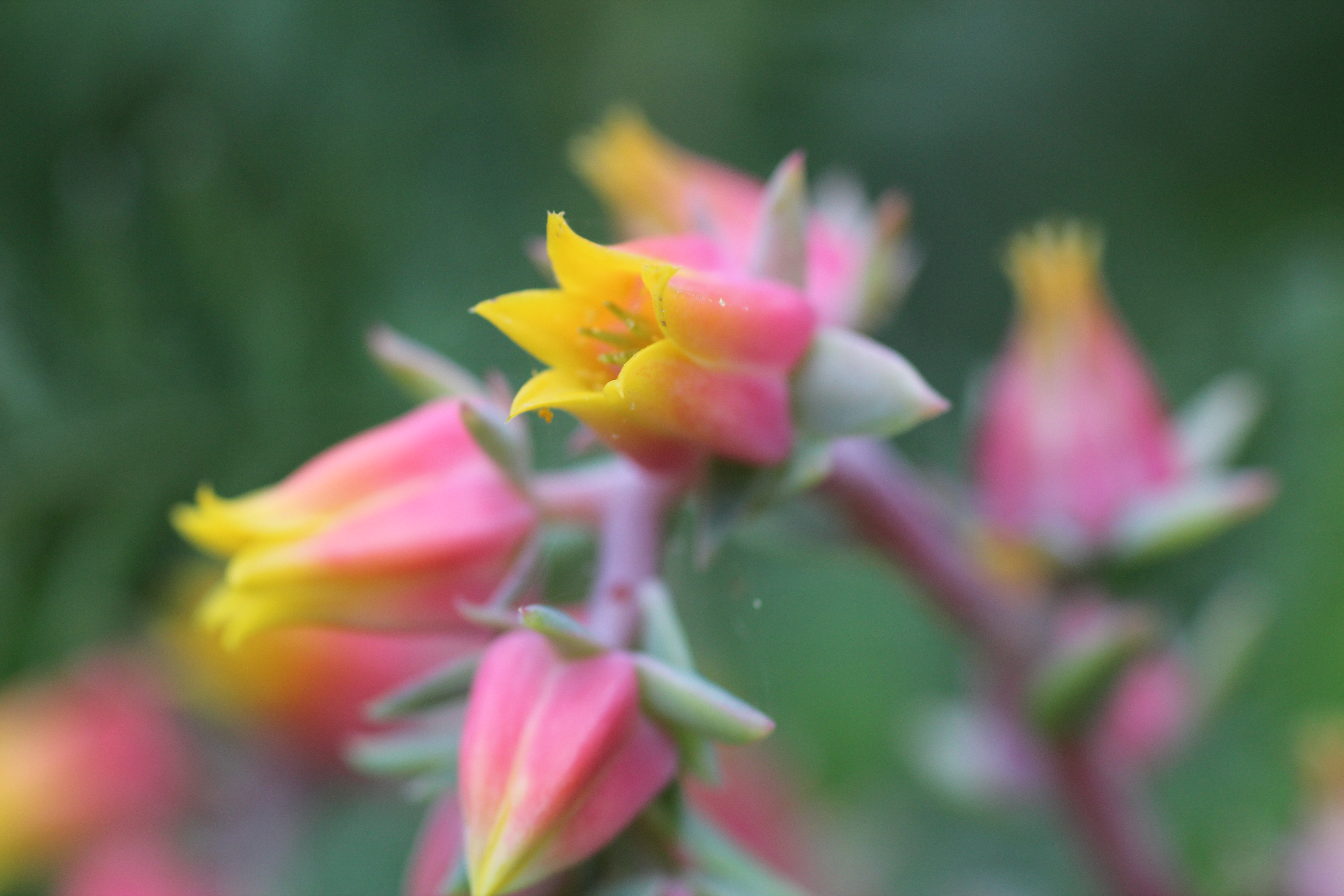 Blüten einer Echeveria pumila